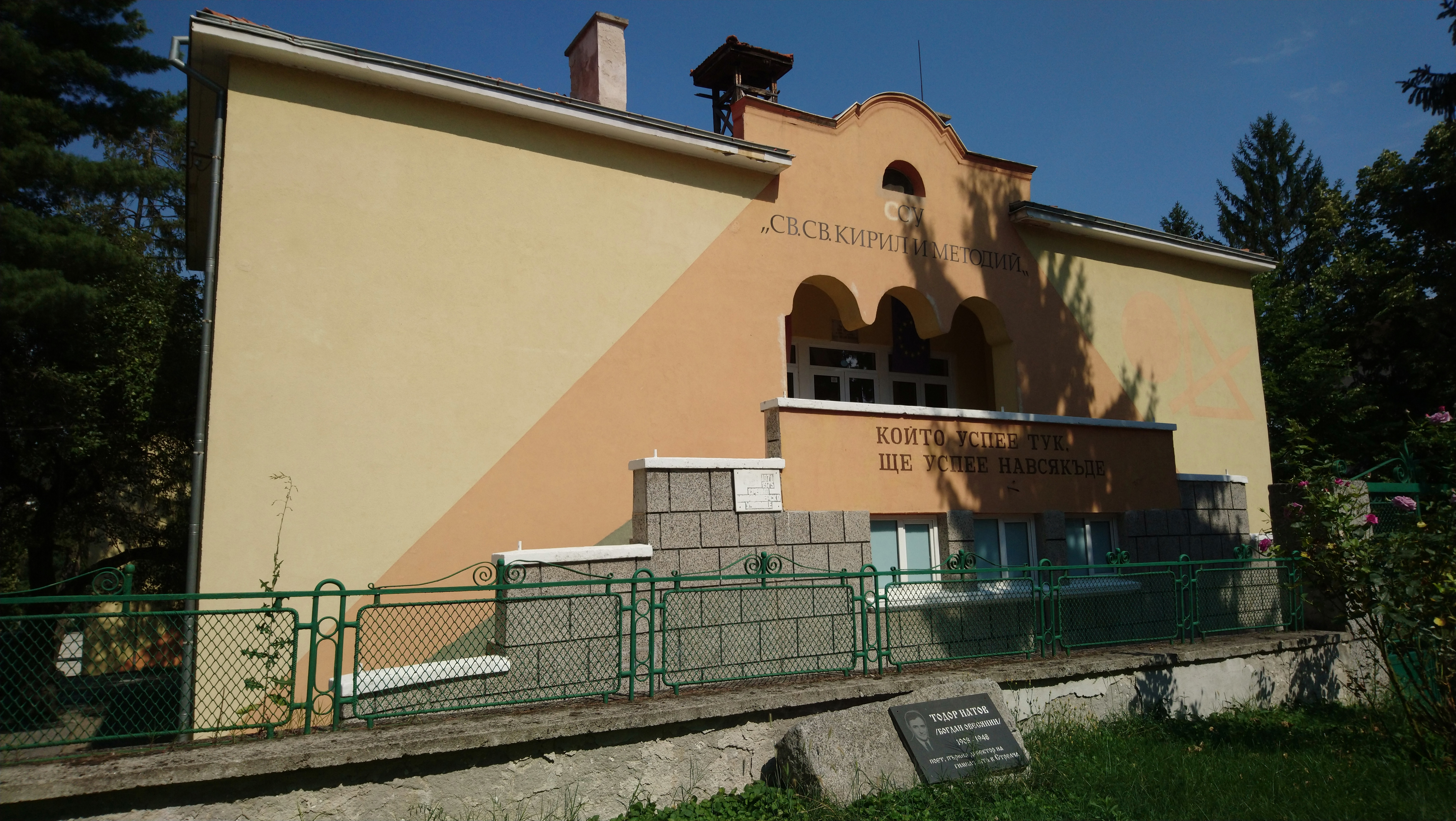 Новата паметна плоча на поета Богдан Овесянин пред училище Св. Св. Кирил и Методий, Стрелча